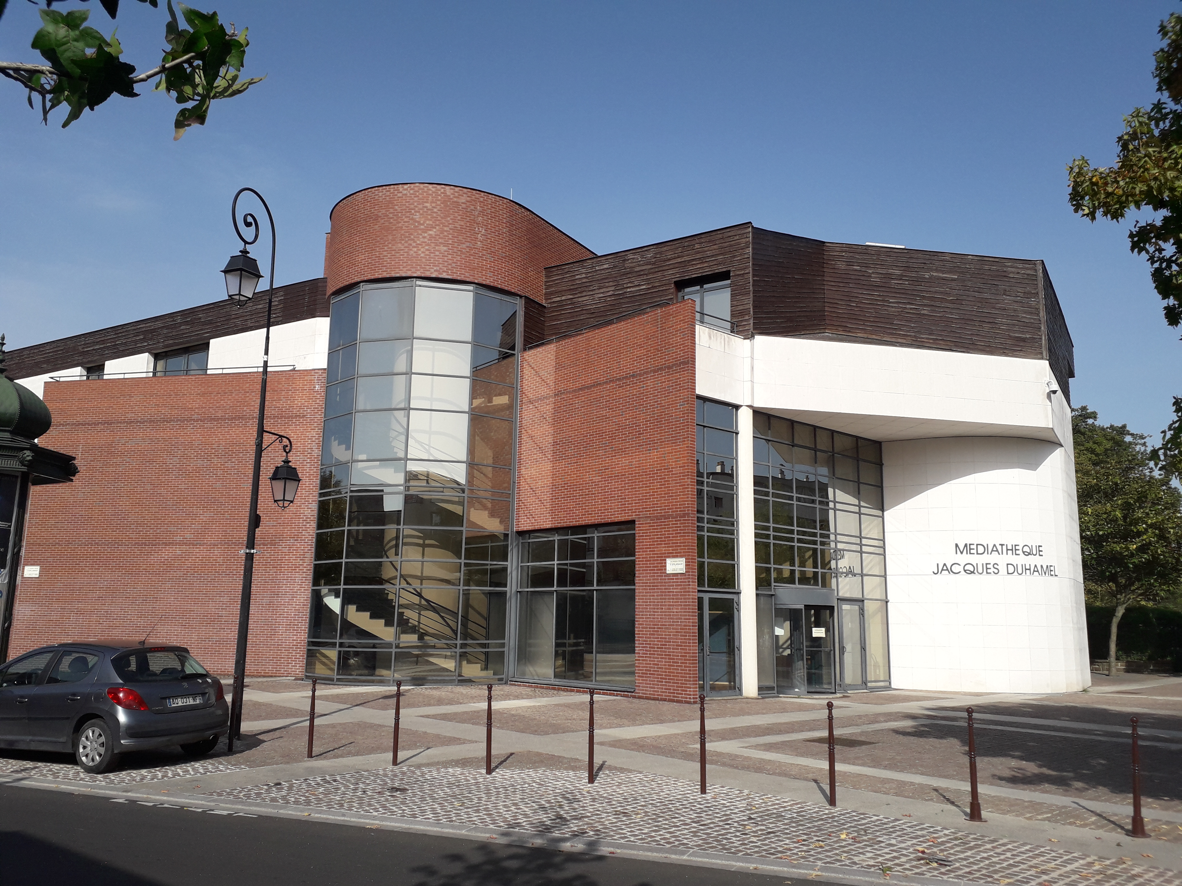 Façade de la médiathèque Jacques Duhamel, sur l'esplanade du 7 juillet 1899, en face de la place du marché, près de l'avenue Ardouin. Le Plessis-Trévise (Val-de-Marne, France).